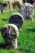 Stèles discoïdales au cimetière de Sainte-Engrâce (Soule) (Pyrénées-Atlantiques) Pyrénées).